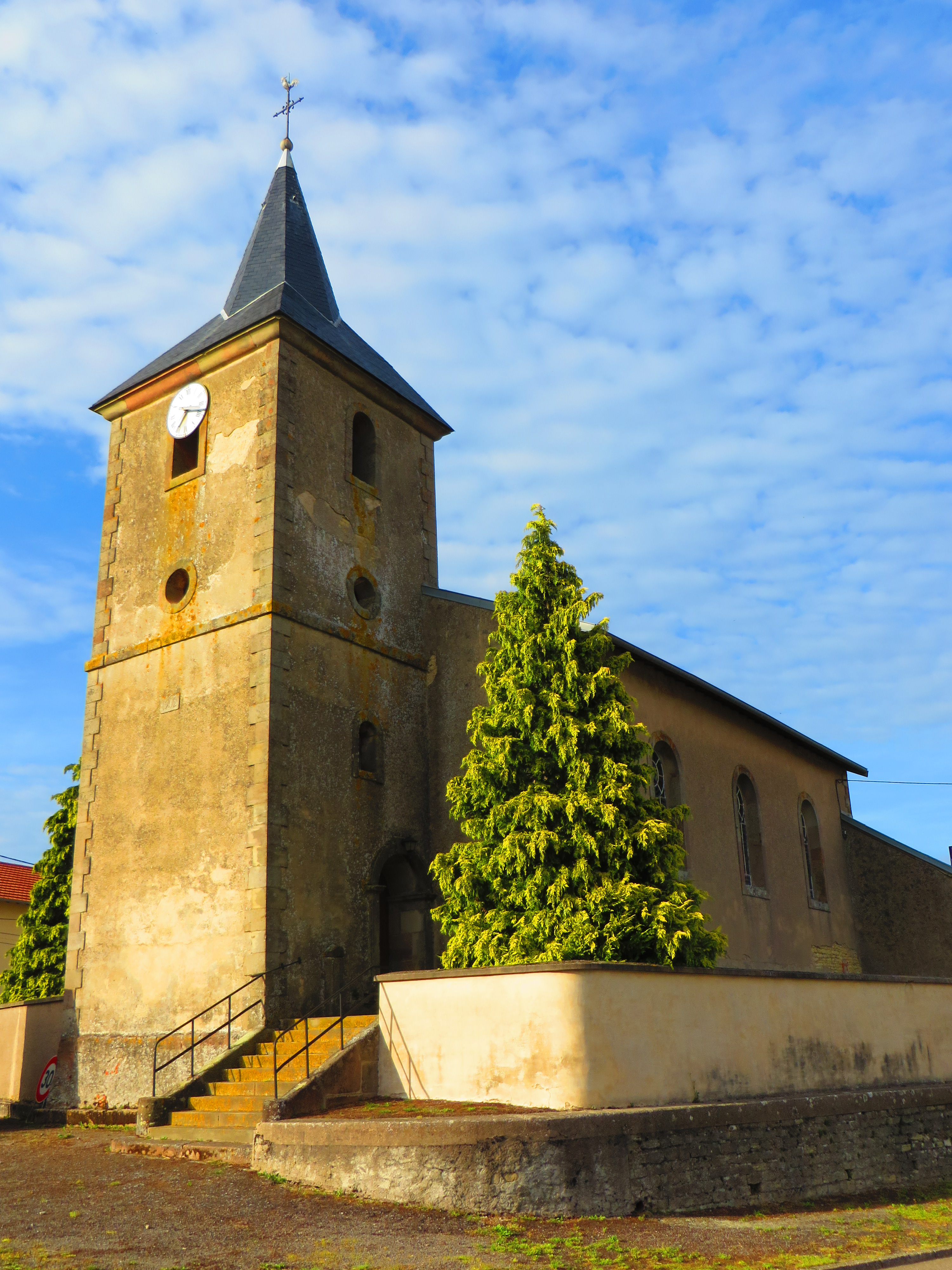 Moncourt eglise